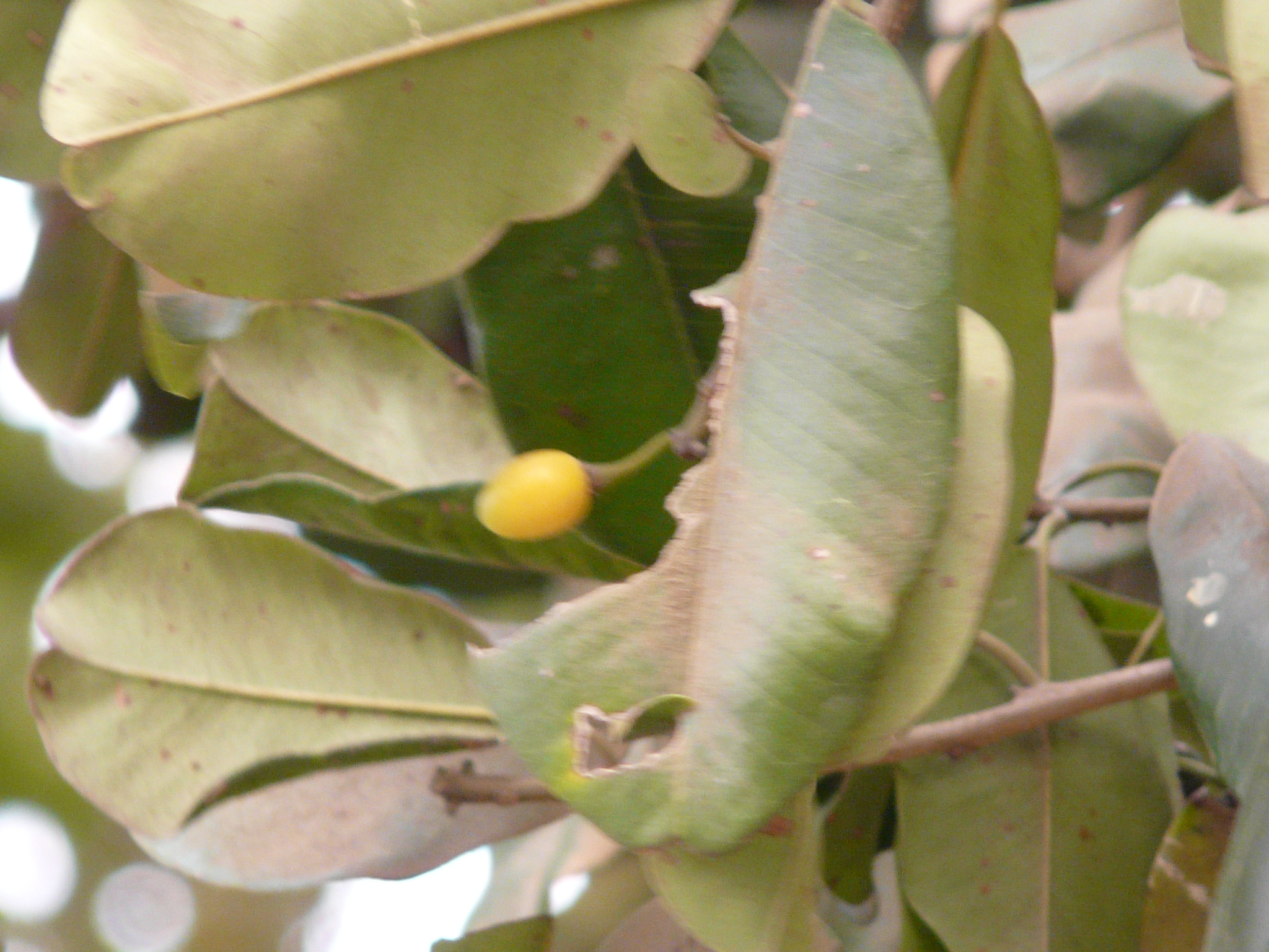 Sapotaceae (sapota family) » Manilkara hexandra man-il-KAR-uh -- Latinized form of the S. American vernacular name for Malabar heks-AN-druh -- meaning, having six stamens commonly known as: Ceylon iron wood, milk tree, wedge-leaved ape flower • Bengali: krikhiyur • Gujarati: ખિર્ની khirni, રાયન rayan • Hindi: दृढ़ drirh, खिरनी khirni, क्षीरी kshiri, रायन rayan • Kannada: bakula • Konkani: कर्णी karni, रांजण ranjana • Malayalam: കൃണി krini, പഴമുന്പാല pazhamunpaala • Marathi: करणी karani, खिरणी khirni, राजण rajana, रांजण ranjana, रायण rayan, रायणी rayani • Sanskrit: क्षीरिणी kshirini, निम्बबिज nimbabija, राजादन rajadana • Tamil: உலக்கைப்பாலை ulakkai-p-palai • Telugu: అంకాలు ankalu, నందివృక్షము nandivriqshamu, పాలచెట్టు palachettu Native to: India, China, Bangladesh, Sri Lanka References: The Book of INDIAN TREES by K. C. Sahni • eFlora • NPGS / GRIN